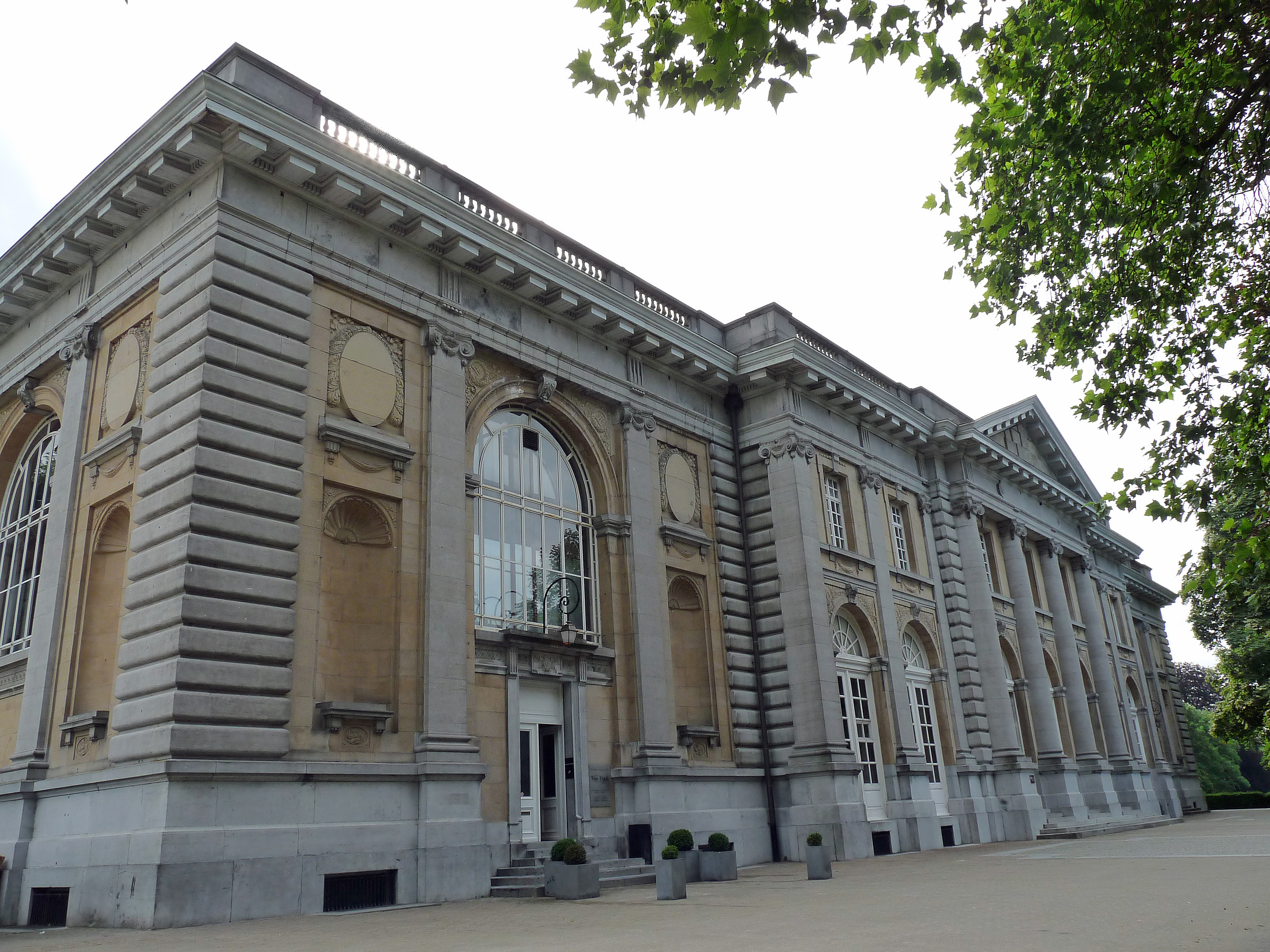 Tervuren (Belgique) : ancien Palais des Colonies